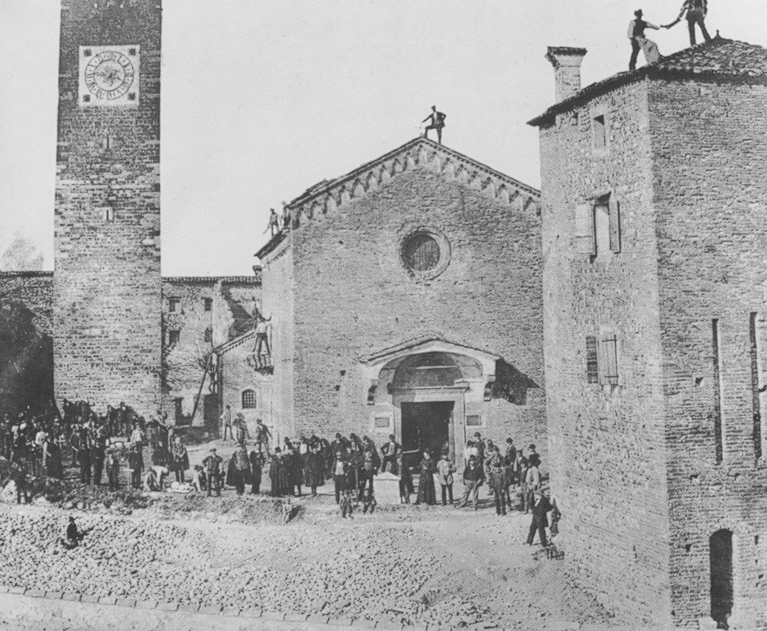 Fotografia della demolizione dell'antica chiesa di San Paolo.